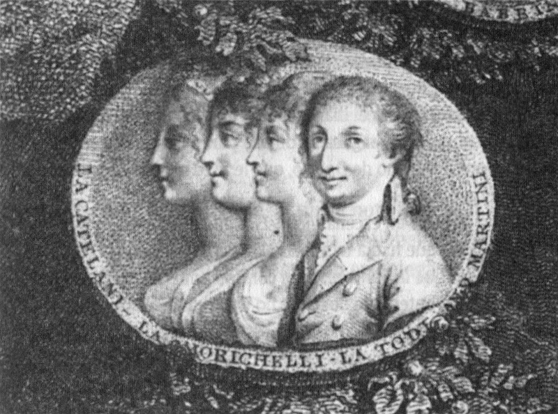 Pietro Bettelini (1763–1829) nach Luigi Scotti: Die Sängerinnen Angelica Catalani (1780–1849), Anna Morichelli (1745–1800) und Luísa Todi (1753–1833) mit dem Komponisten Vicente Martín y Soler (1750/54–1806). Italien/England, Ende des 18. Jahrhunderts. Kupferstichkabinett des Theatermuseums Wien.